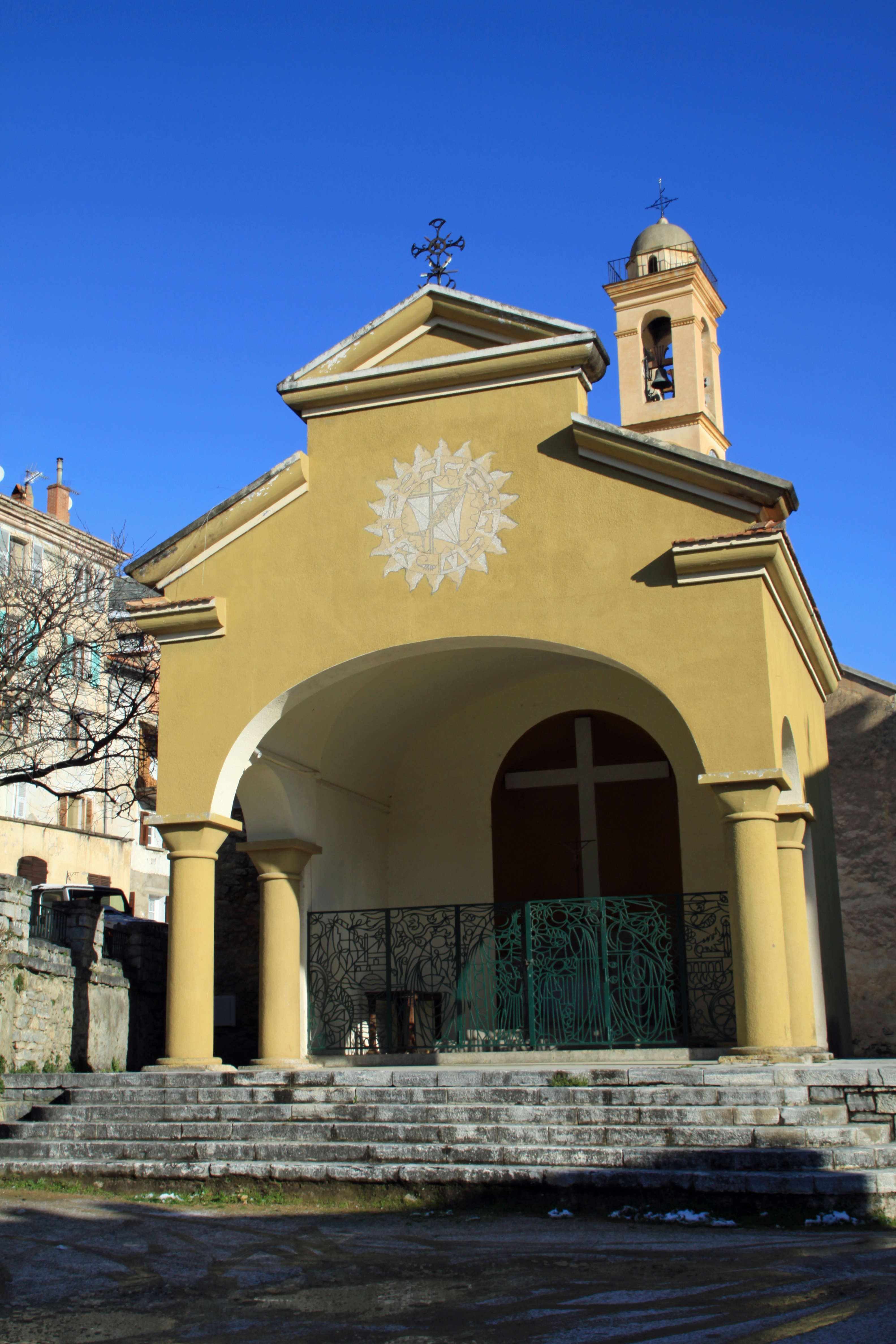 Corte (Corse) - Chapelle Saint Théophile et le clocher de l'église de l'Annonciation